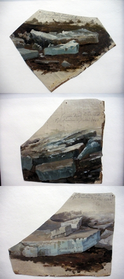 Skizzen von Eisschollen zum Gemälde das Eismeer